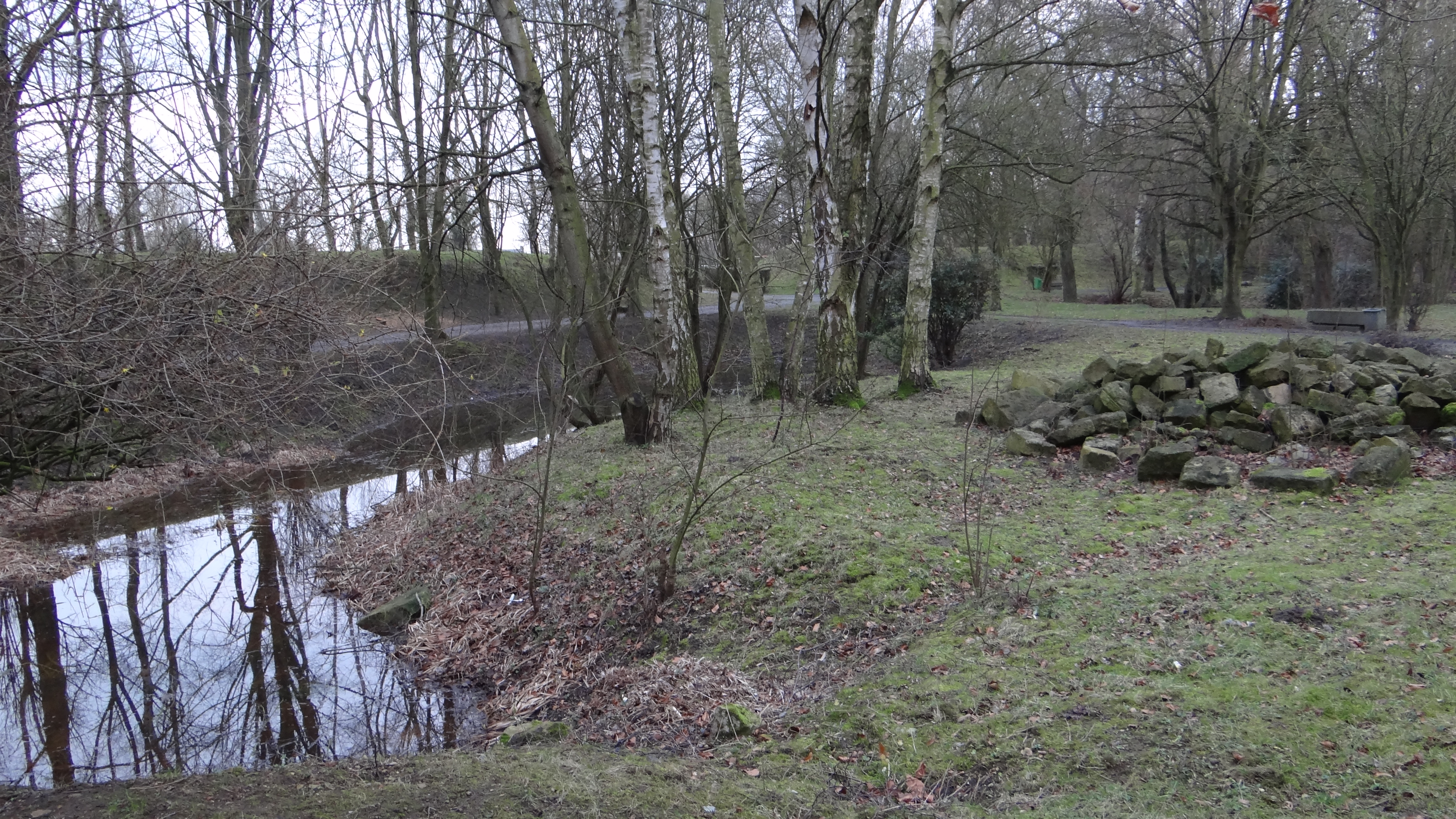 Maing - Parc archéologique de l'abbaye de Fontelle